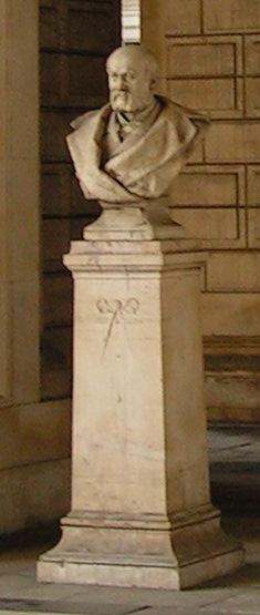 Buste de l'architecte Poelaert. Sculpteur à identifier. Source Photo prise au Palais de Justice de Bruxelles le 2004 par Roby [ ✉] 28 aoû 2004 à 06:14 (CEST) Licensing Sculpture : Domaine public. Photo : GFDL